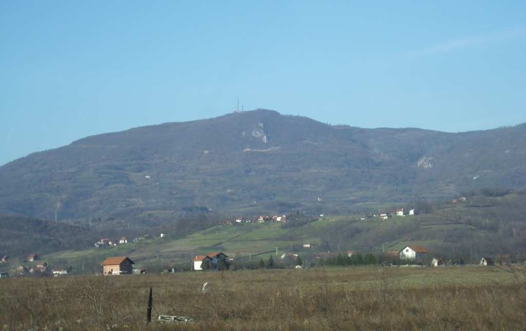 Kozara - Lisina (978m)